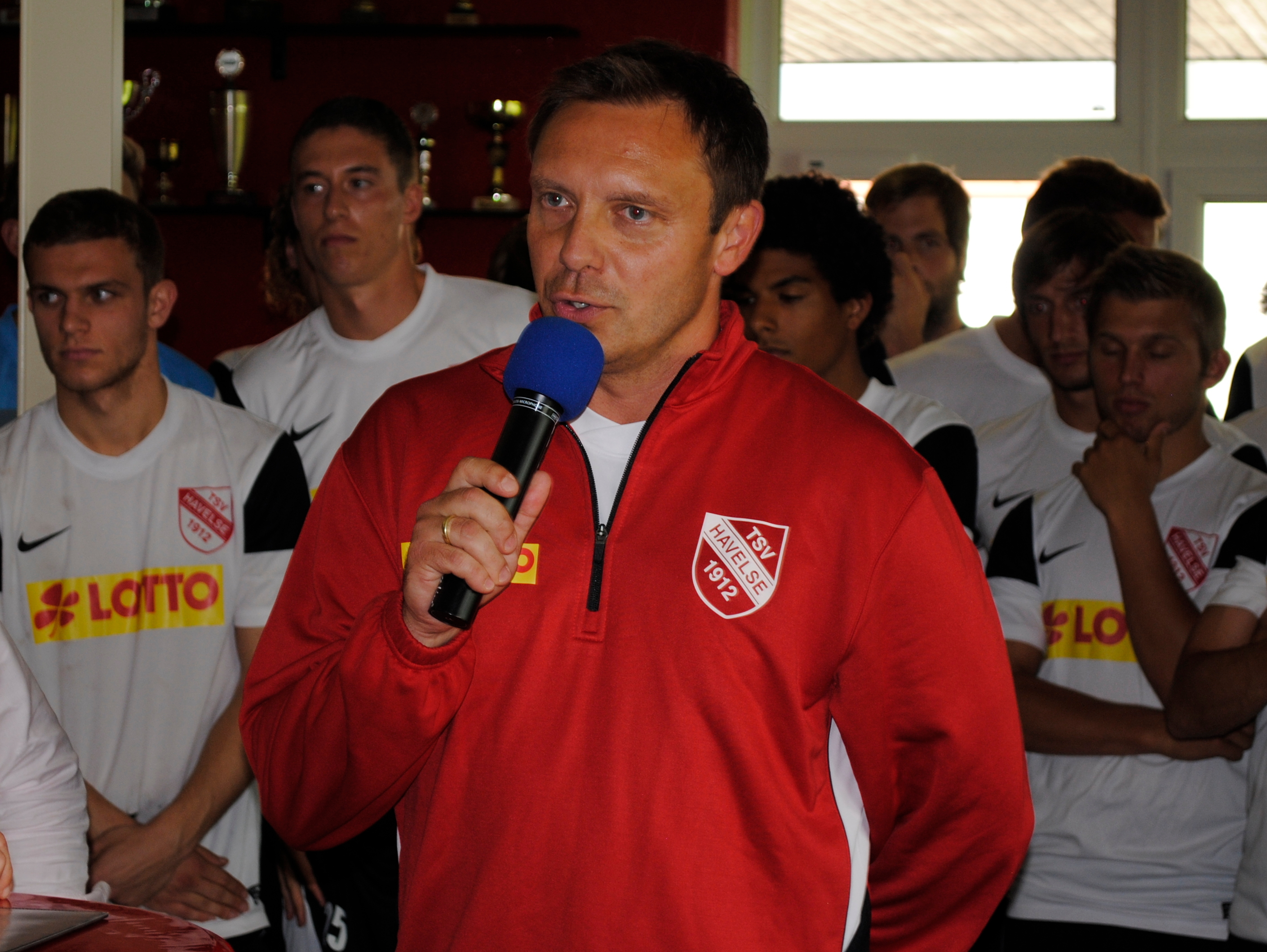 André Breitenreiter bei der Präsentation des Teams des TSV Havelse vor der Saison 2011/12